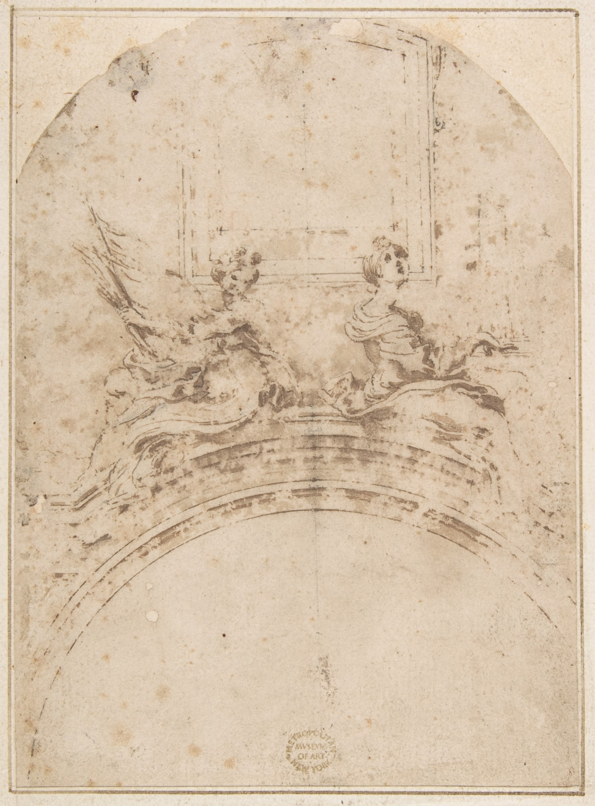 Drawing; Drawings